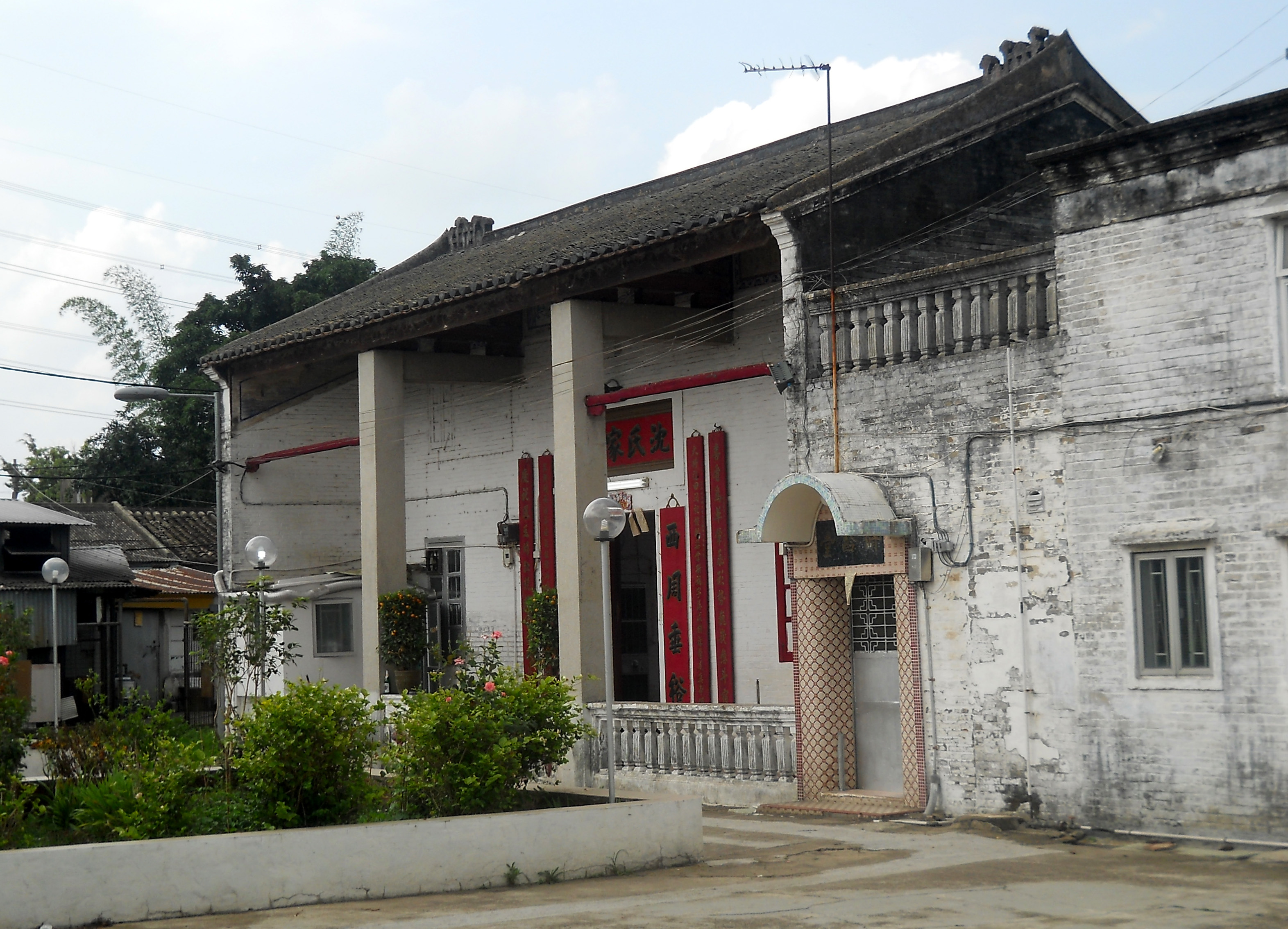 中文（香港）: 朗逢吉鄉上將府沈氏家祠